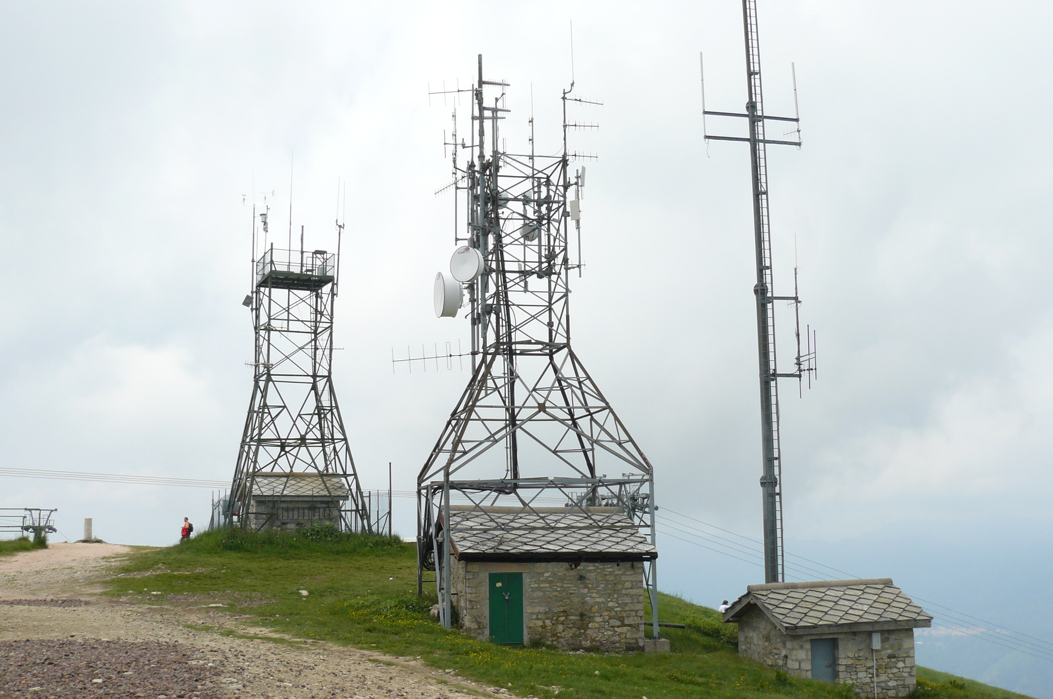 Mottarone - szczyt w Alpach Pennińskich.